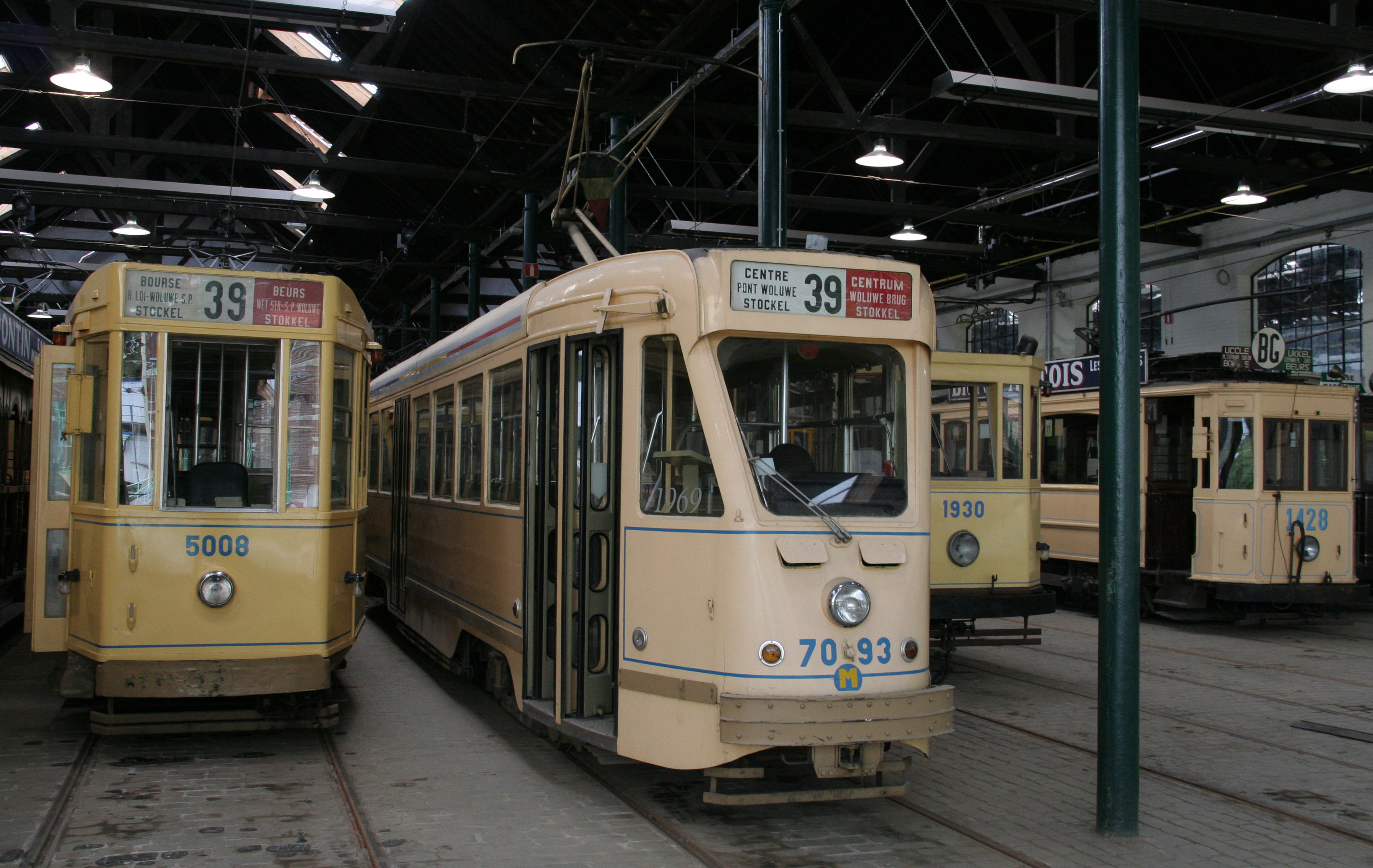 Museutram Brussel MIVB 7093